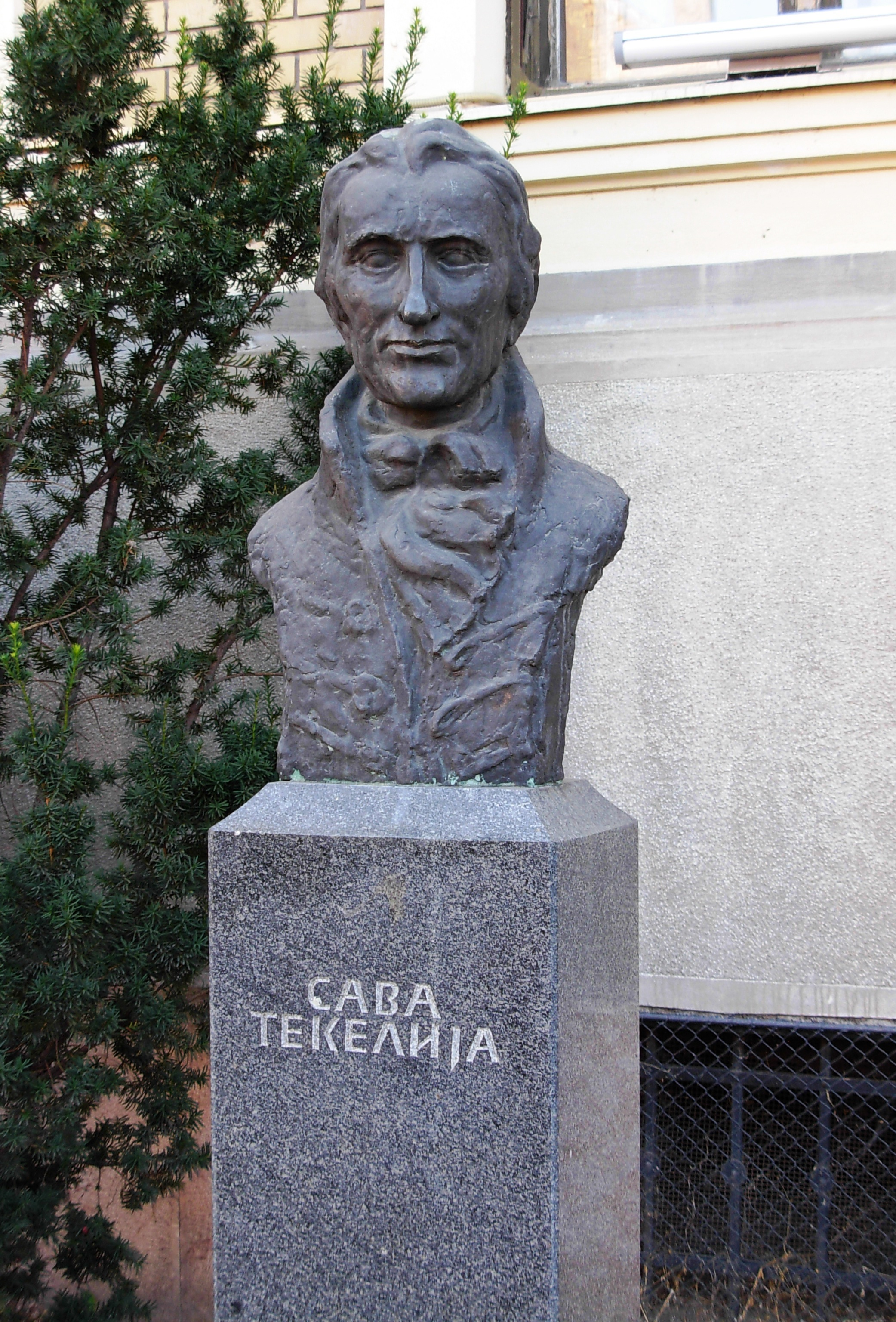 Bista Save Tekelije ispred Matice srpske u Novom Sadu.